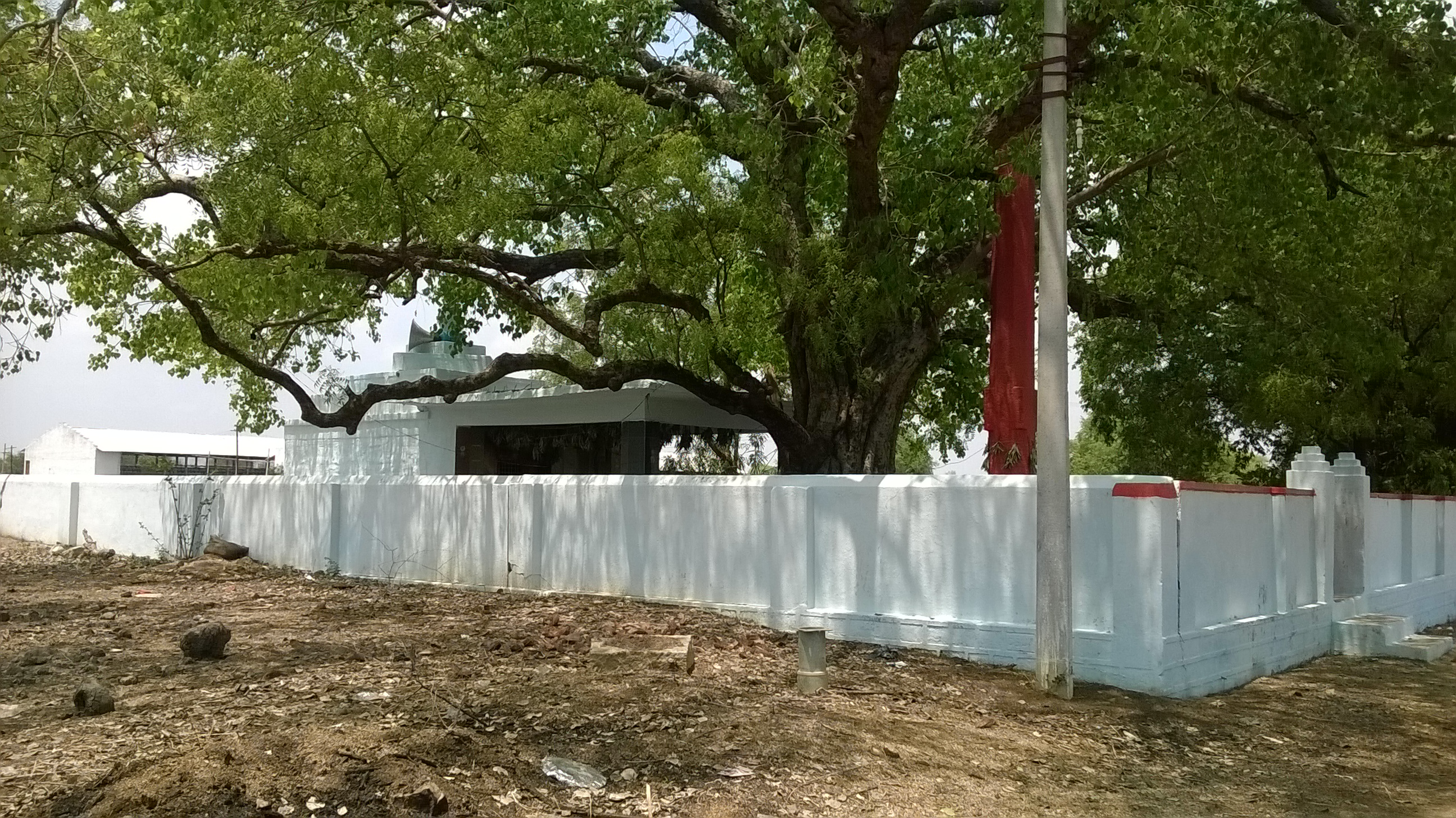 శ్రీఆంజనేయస్వామి దేవాలయం, మహదేవునిపేట